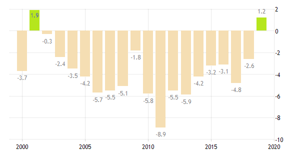 Cari işlemler dengesi. IMF Data and Statistics